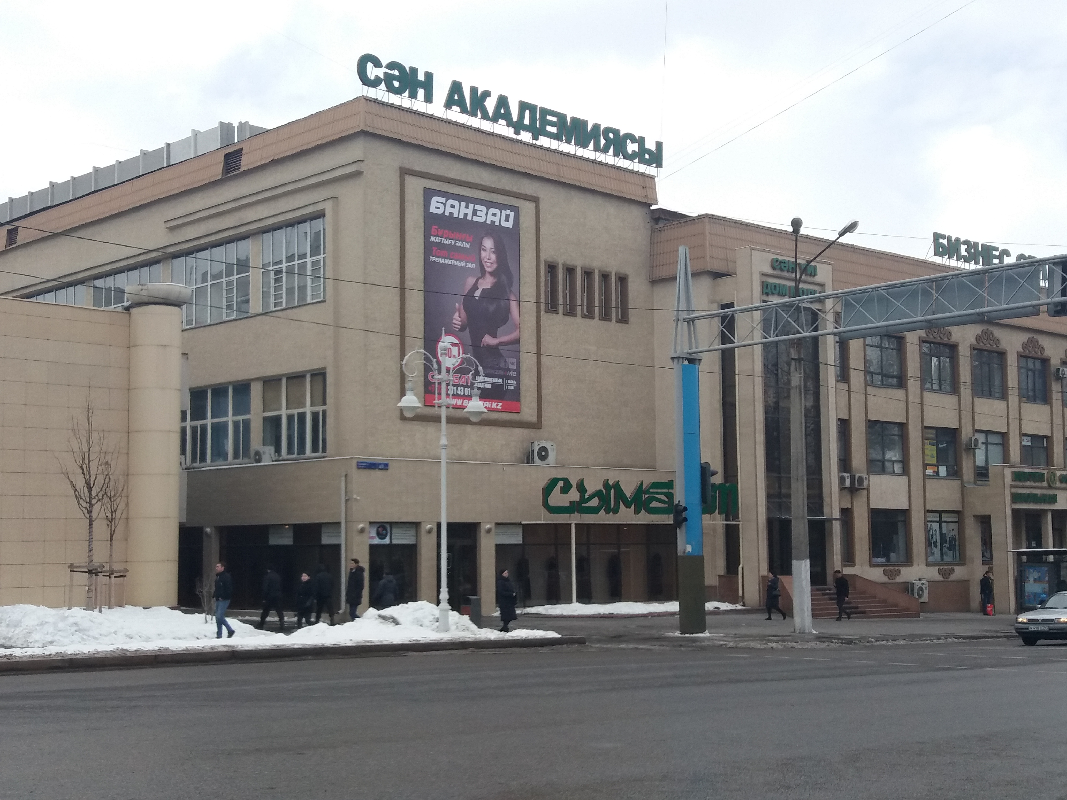 Февраль 2019